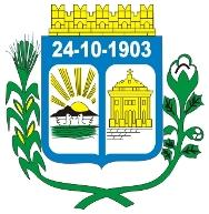 Brasão do Município de Patos